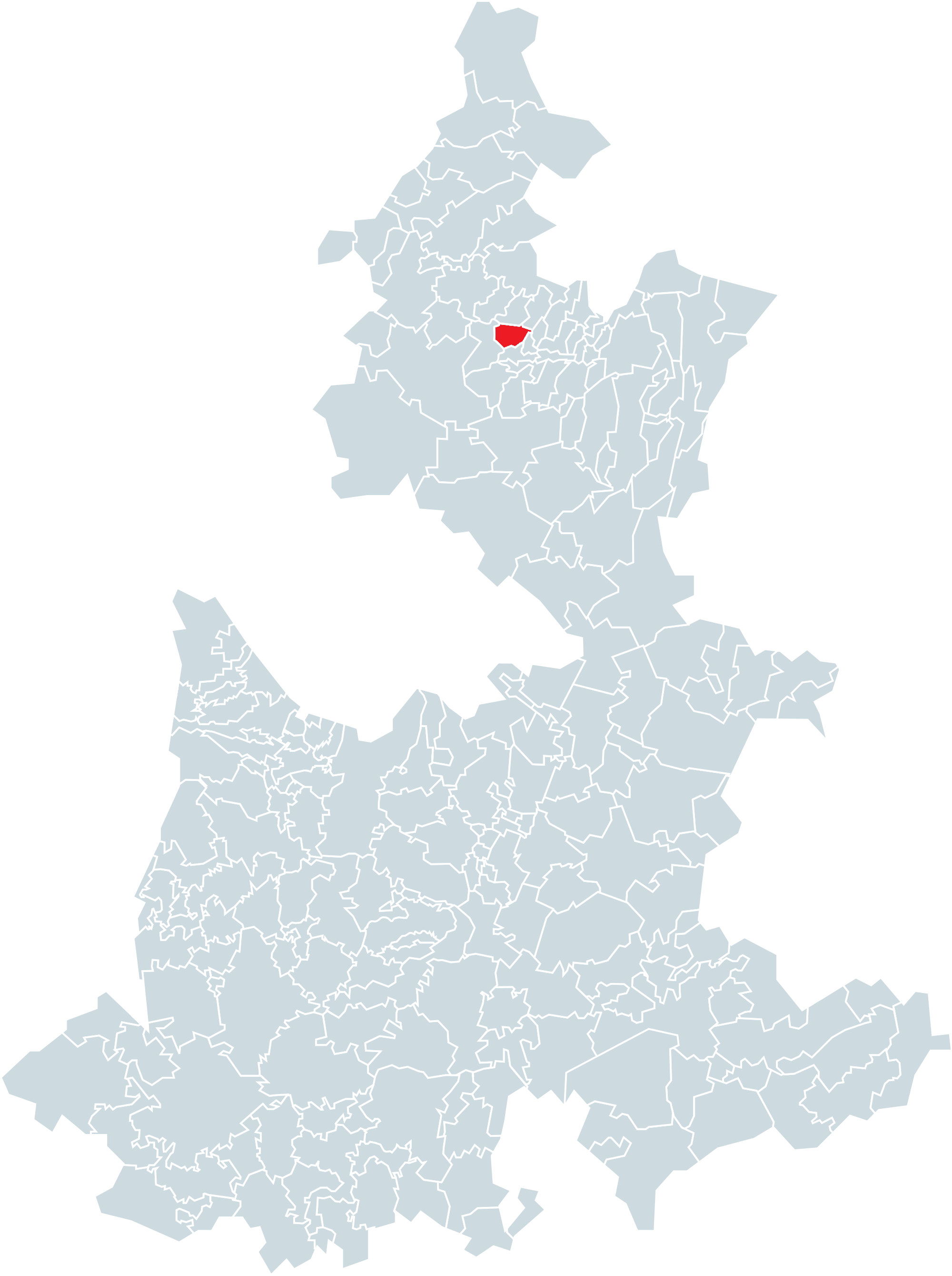 Municipio de Amixtlán